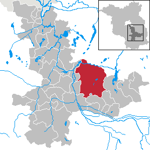 Märkische Heide in Brandenburg (Country) - District Dahme-Spreewald